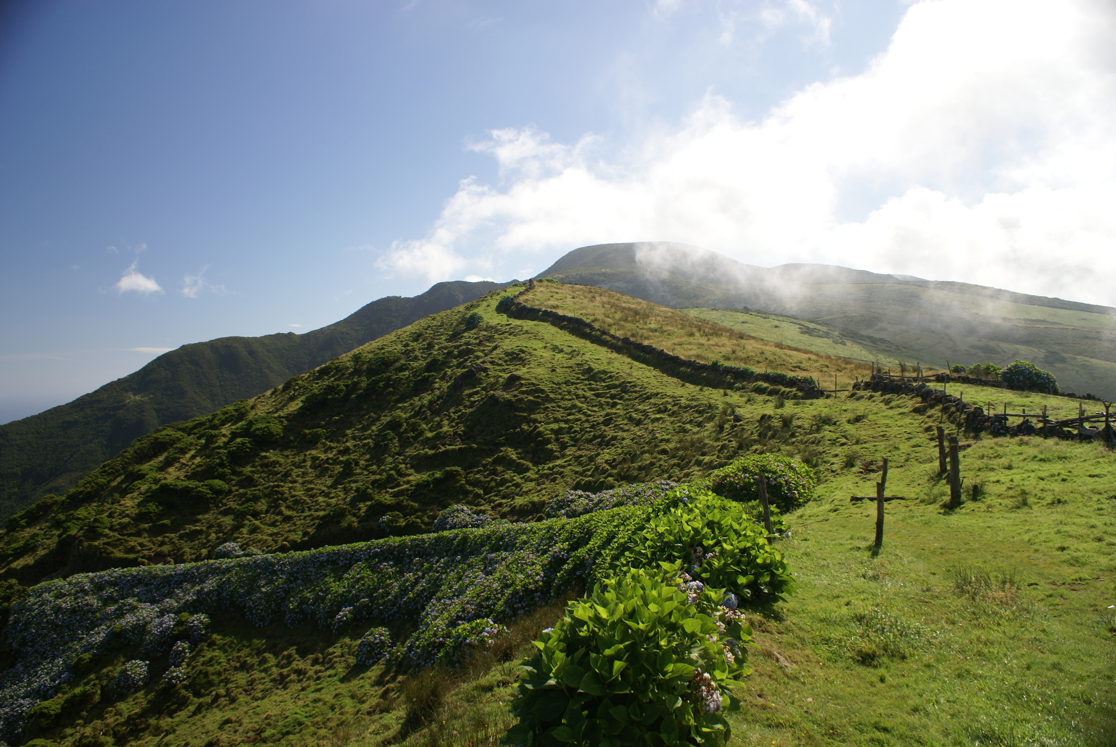 Caminho pedestre da Serra do Topo para a Fajã de Santo Cristo, vista, Calheta, ilha de São Jorge, Açores